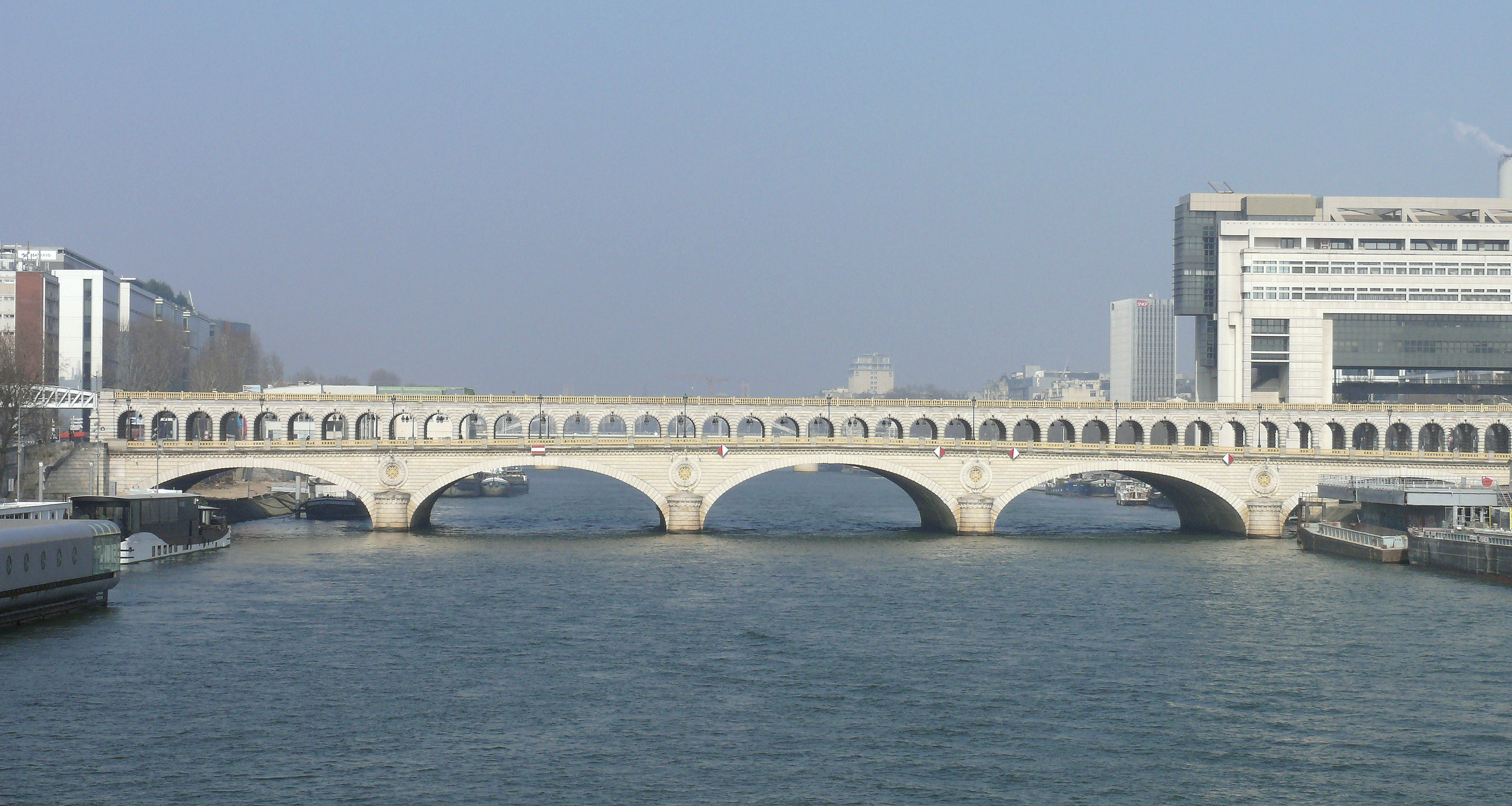 Paris - Pont de Bercy vu de l'amont